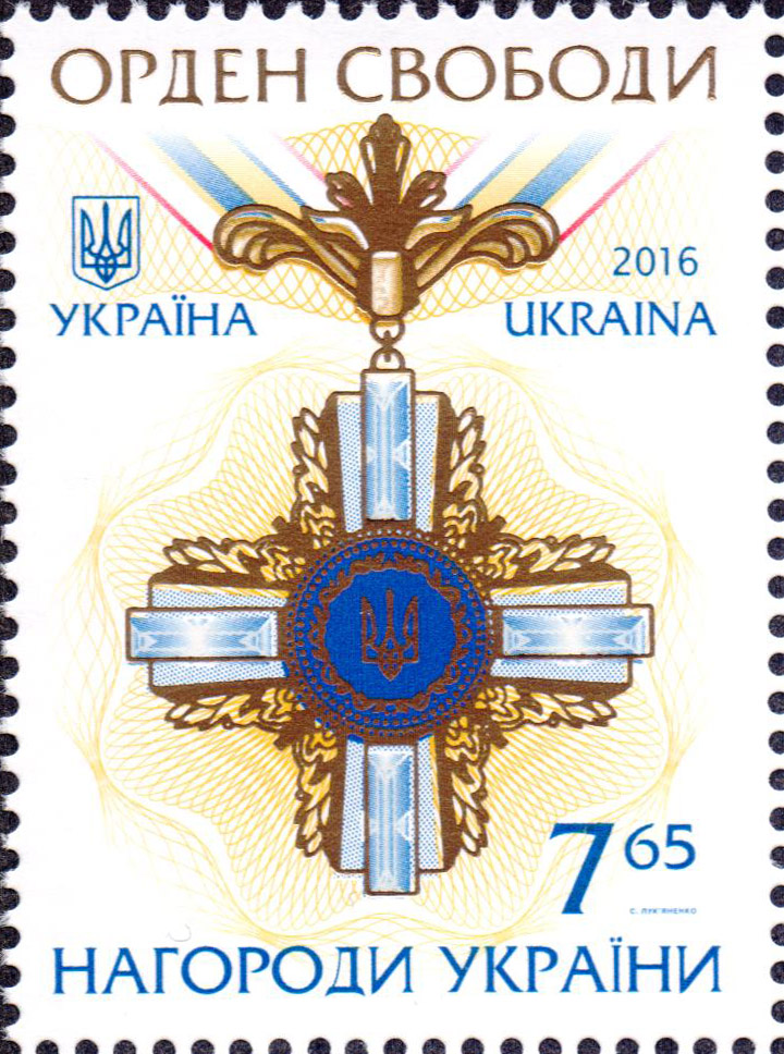 Поштова марка України № 1521. Серія «Нагороди України». «Орден Свободи». 7,65 грн